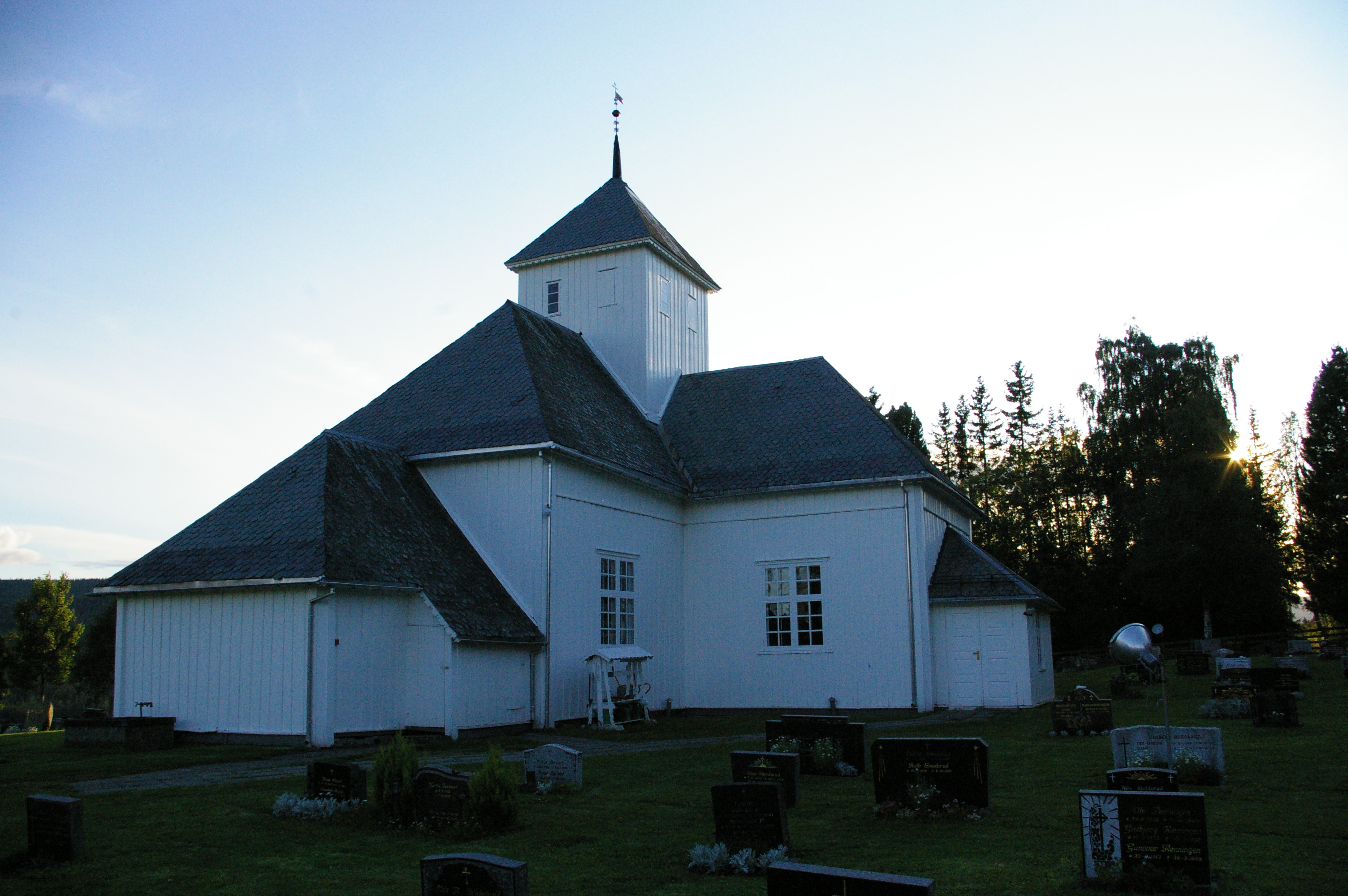 Lunde Kirke